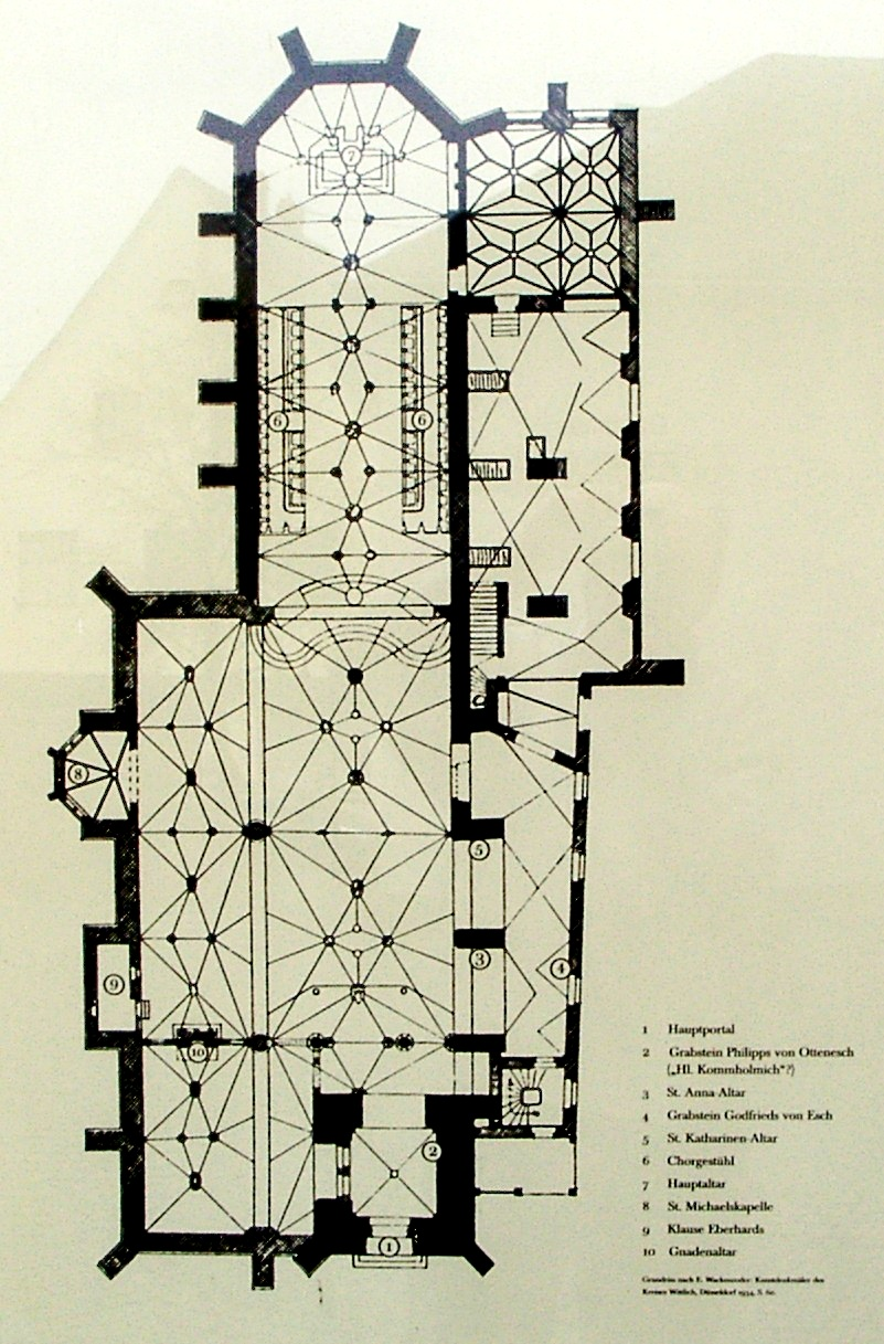 Grundriss Wallfahrtskirche Klausen (Infotafel an der Kirche)